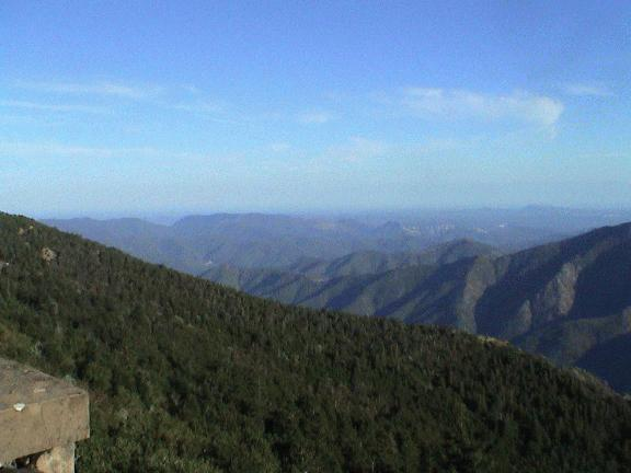 Vue depuis le mont Aigoual France 2004. Cevenol2